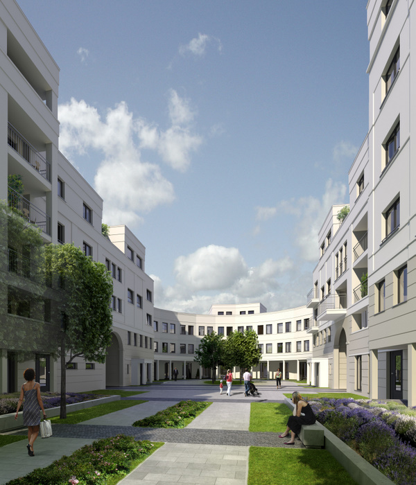 Interboden und Hochtief Bauprojekt, Le Flair, Düsseldorf